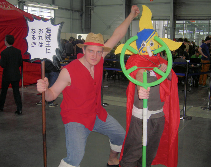 Cosplay One Piece na Festiwalu Fantastyki Pyrkon 2014